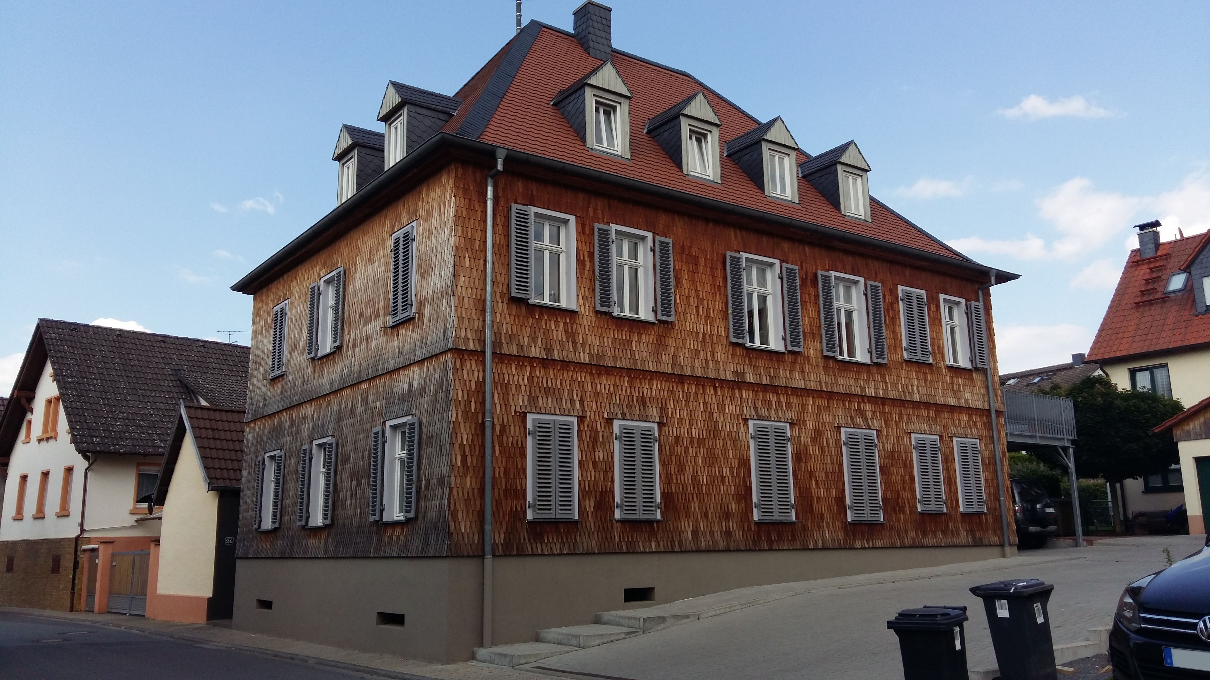 Alte Bürgermeisterei von von (Nieder-)Modau in der Kirchstraße 26 in Ober-Ramstadt (von Süd-Westen).